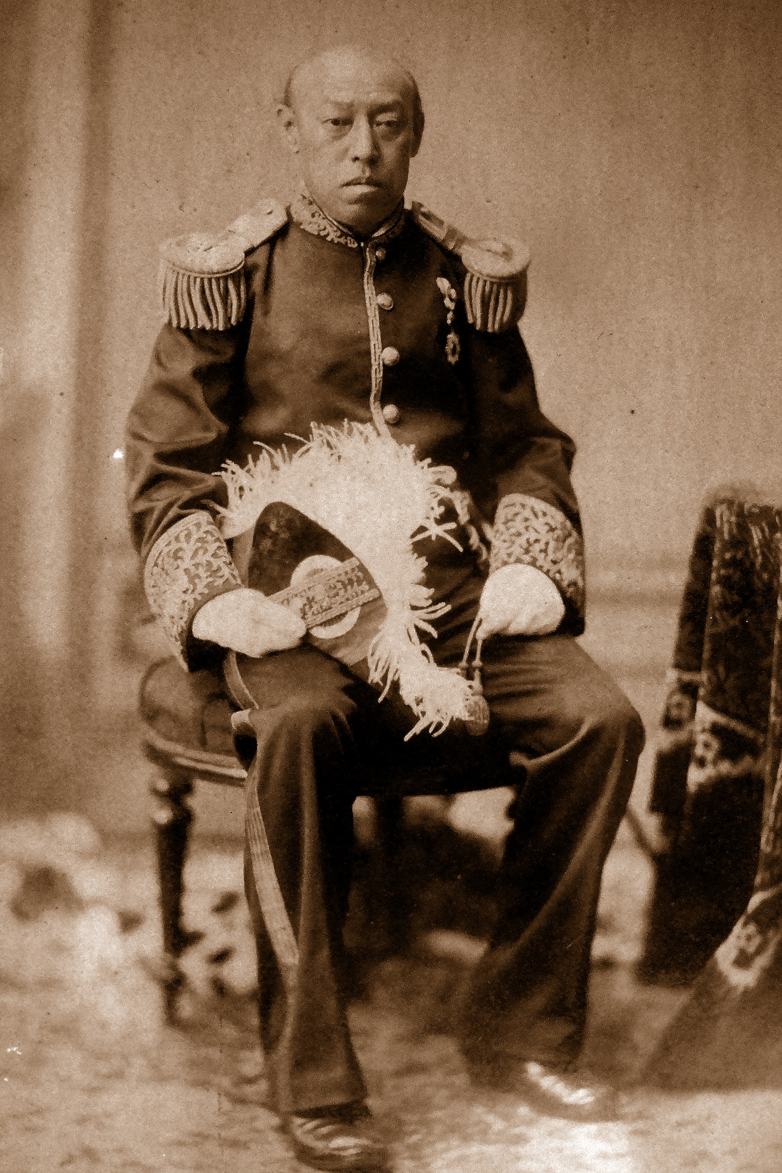 成瀬正肥 （なるせ まさみつ、天保6年12月12日（1836年1月29日）- 明治36年（1903年）2月4日）は、江戸時代末期（幕末期）の尾張藩の附家老。尾張国犬山藩の第9代（最後）の藩主。